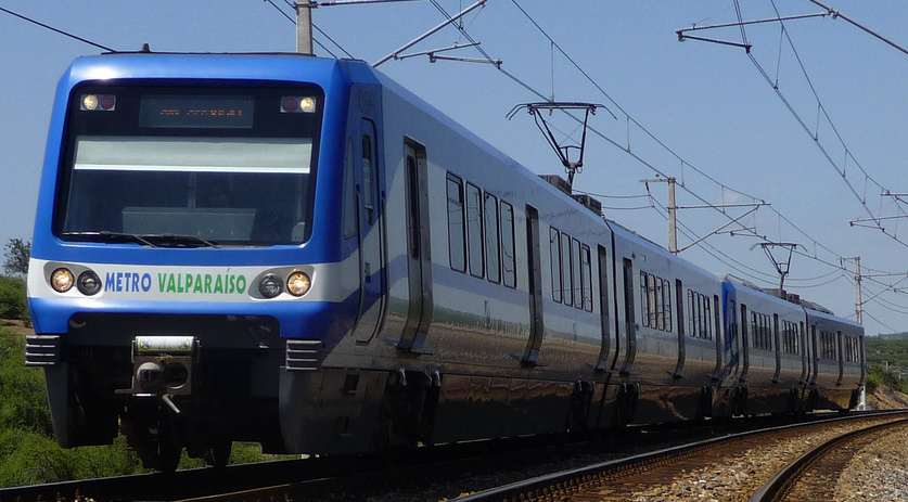 Interestación Limache - Peñablanca.